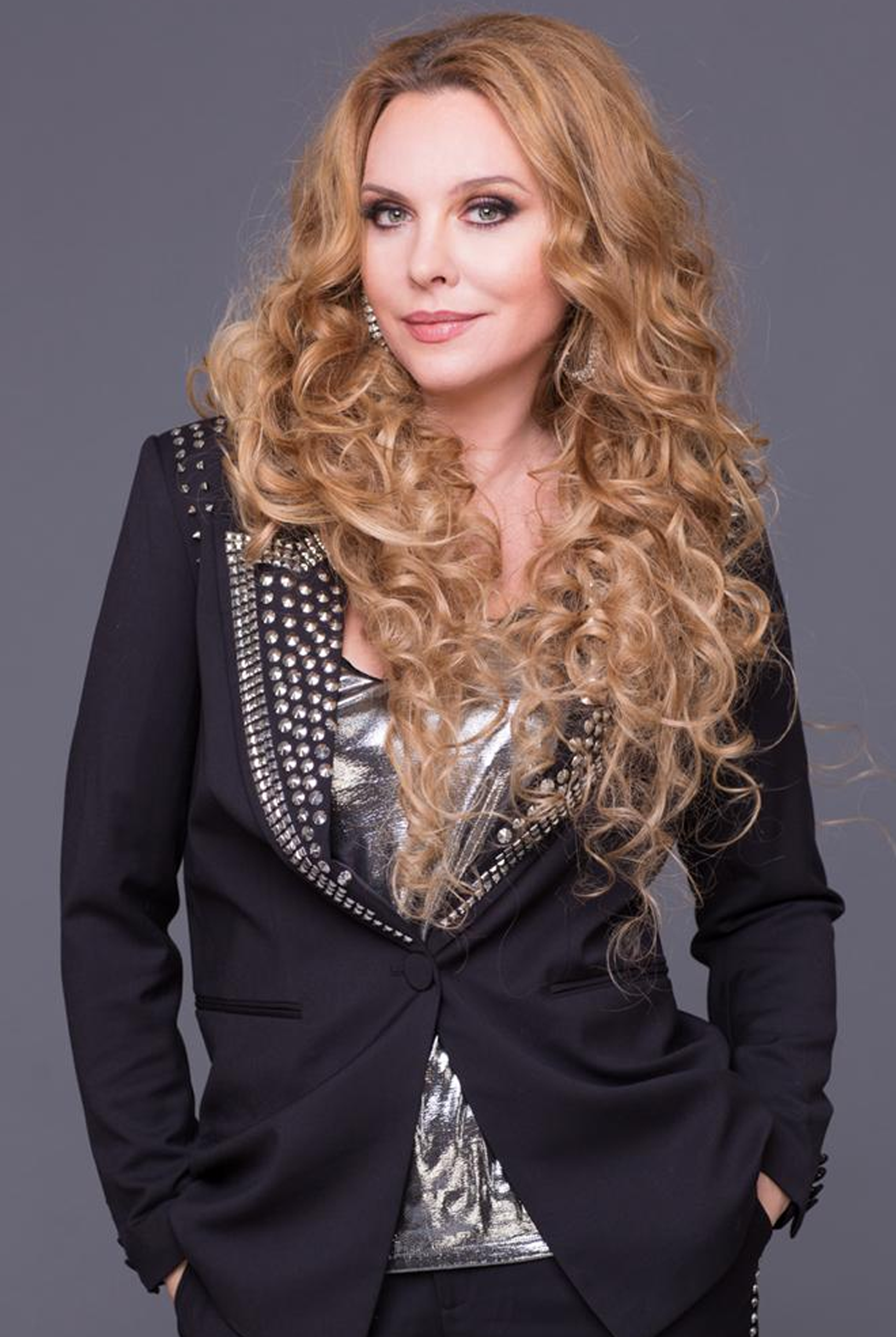 Российская певица.